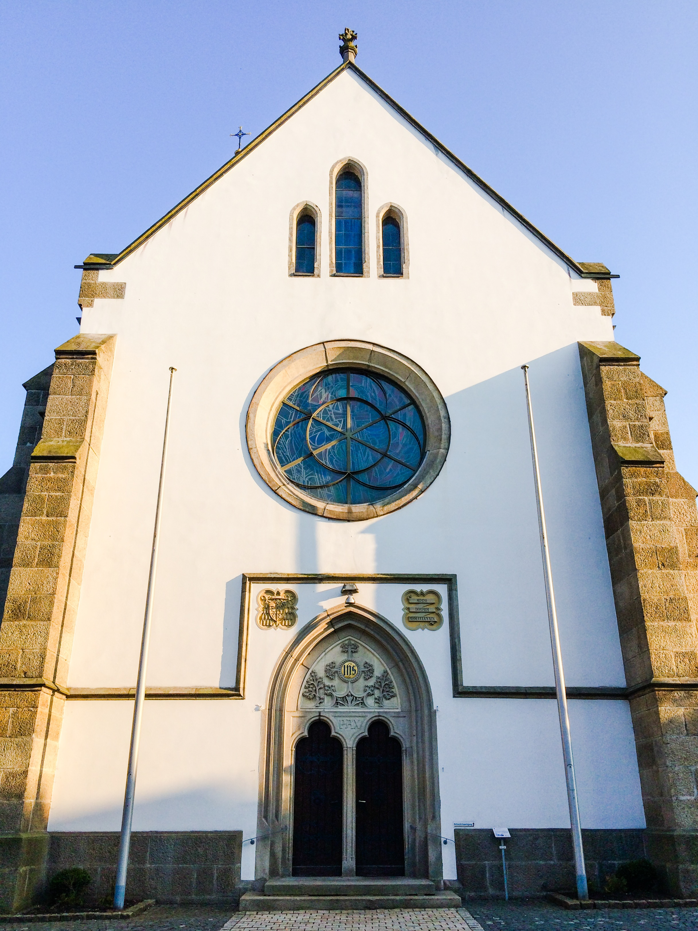 Stadtpfarrkirche zu den zwölf Aposteln Portalansicht März 2014